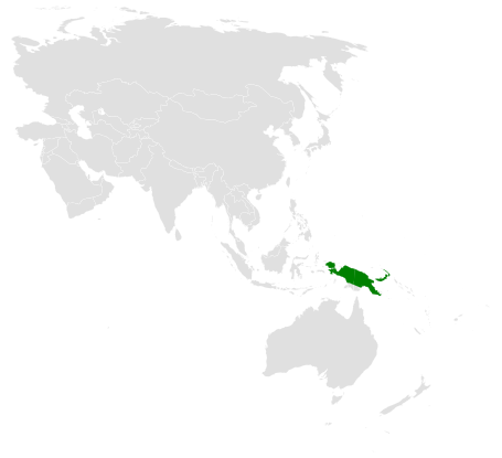 Megalurus macrurus distribution map, based on